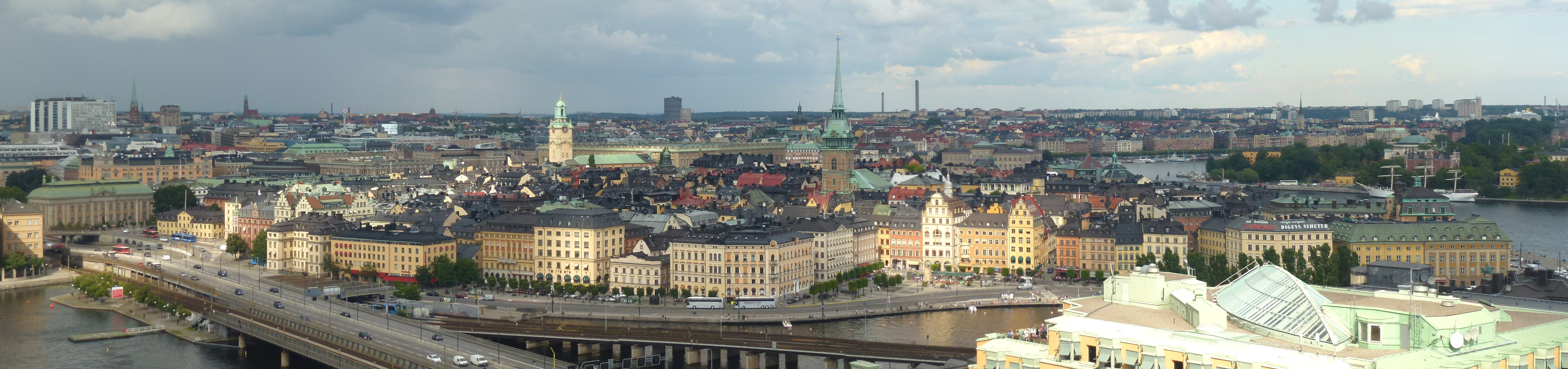 Panorama över Gamla stan från syd